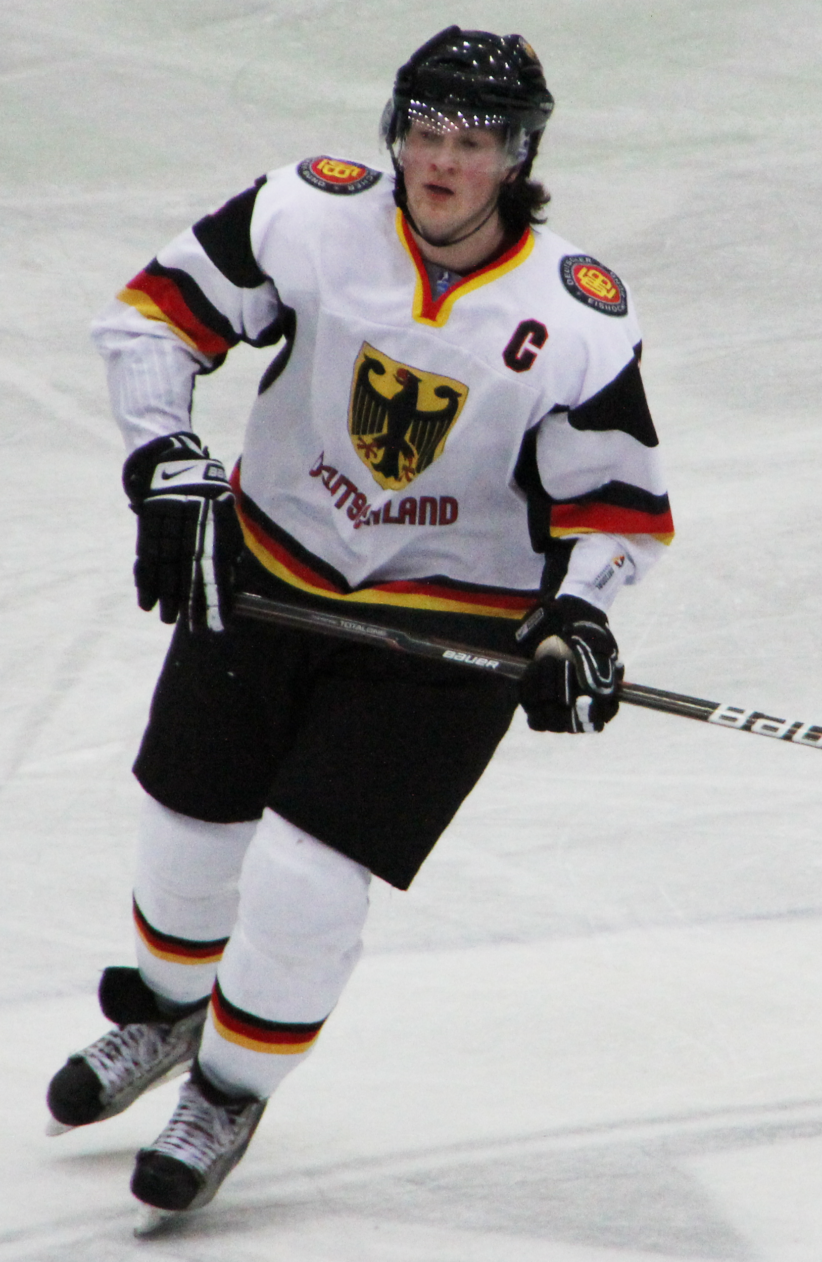 Konrad Abeltshauser im Dress der deutschen Nationalmannschaft. Aufgenommen bei der U-20 B-WM am 11.12.2011 in Garmisch-Partenkirchen